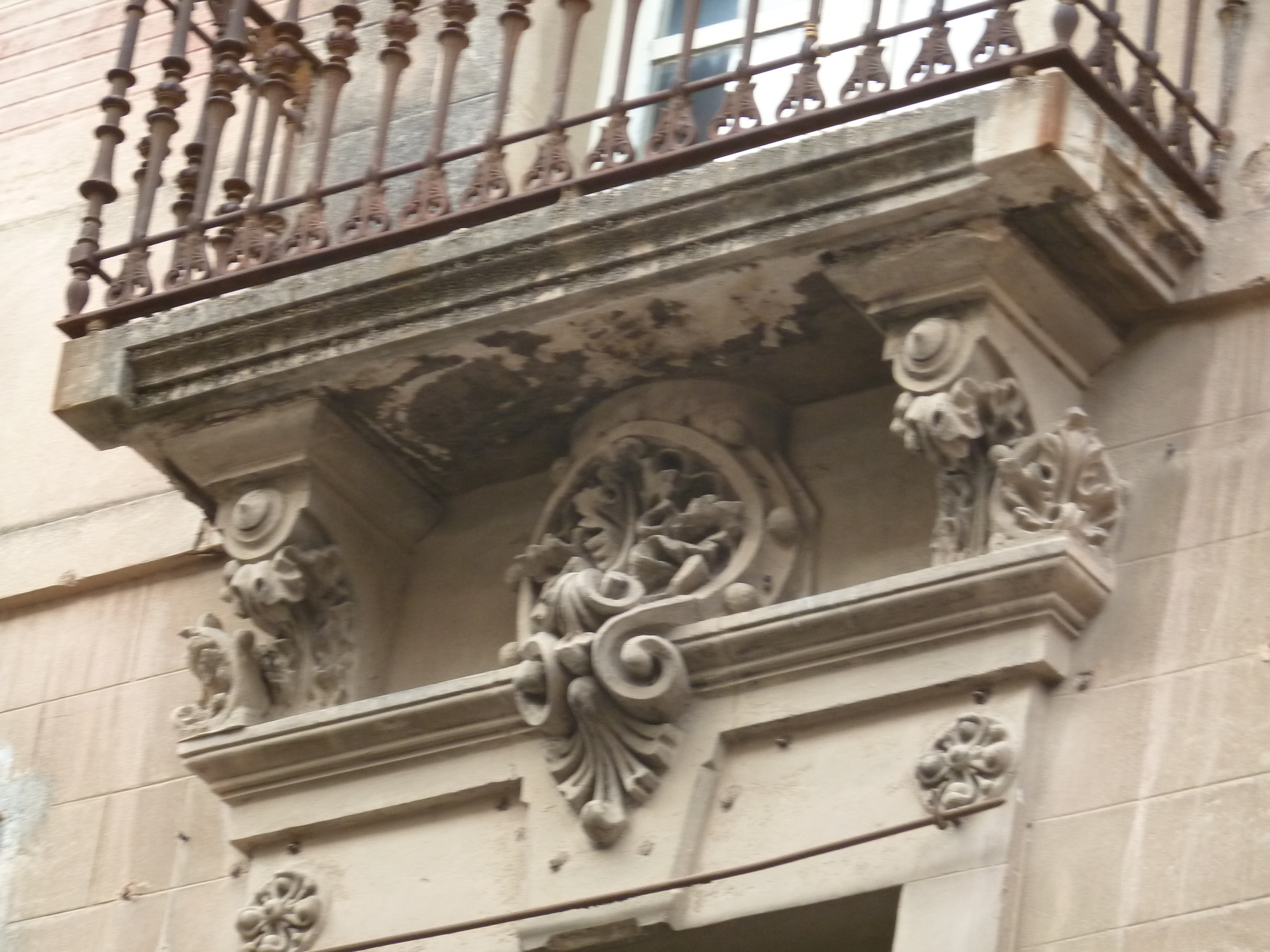 Reus